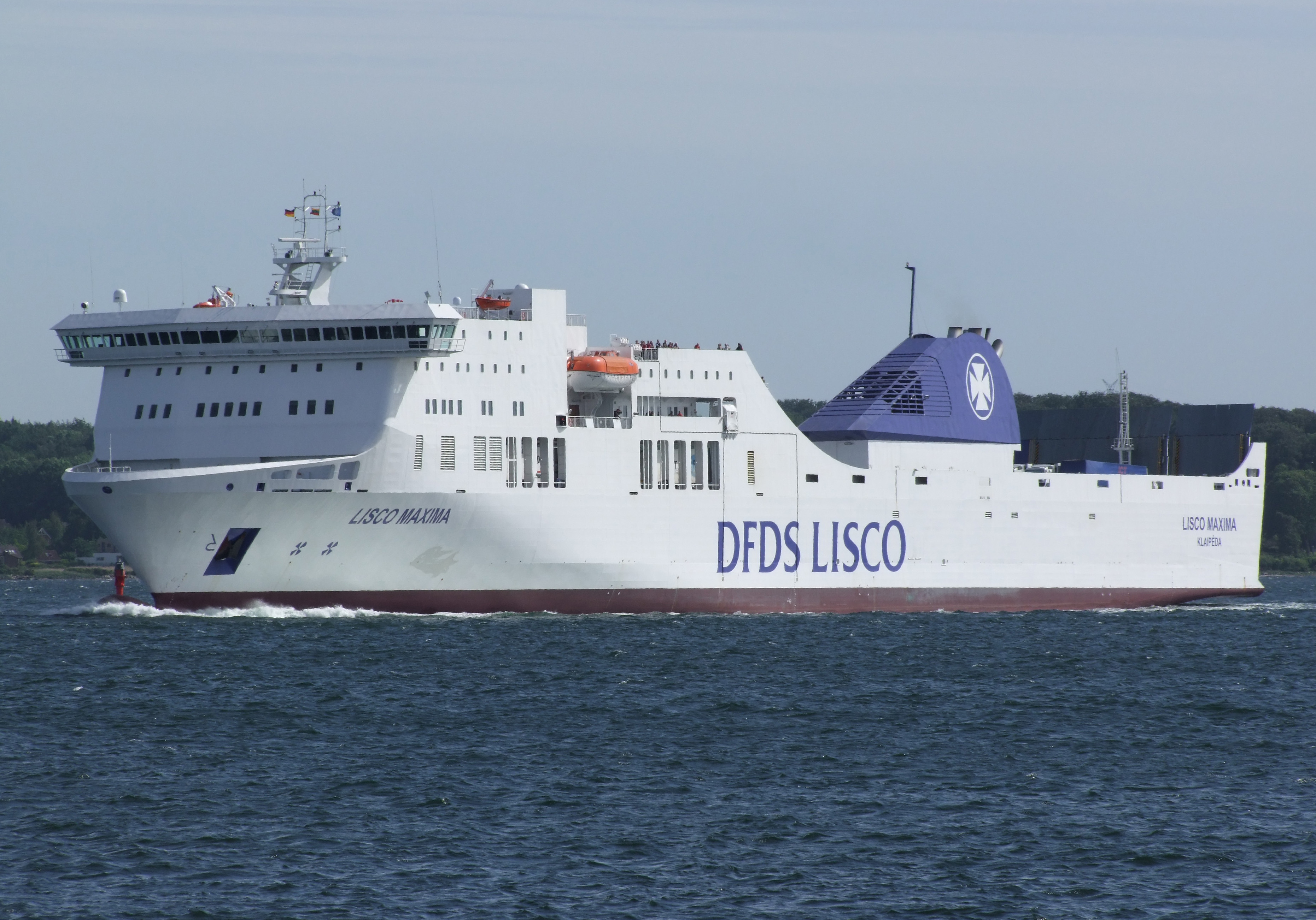 Die Lisco Maxima. Fotografiert in der Kieler Förde IMO Number: 9350721 MMSI Number: 277408000 Callsign: LYTD Length: 199 m Beam: 34 m